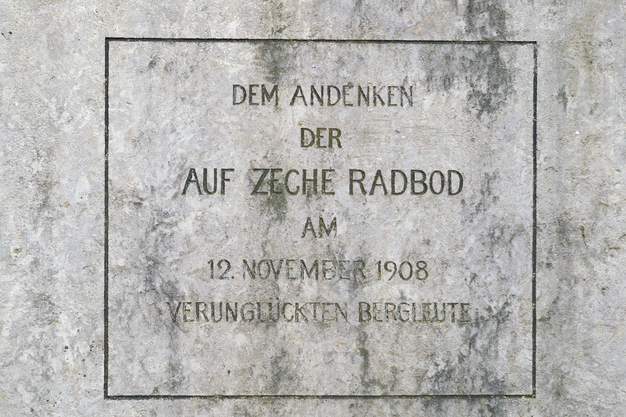 Denkmal, das in Erinnerung an das schwere Grubenunglück in der Zeche Radbod in Bockum-Hövel errichtet wurde